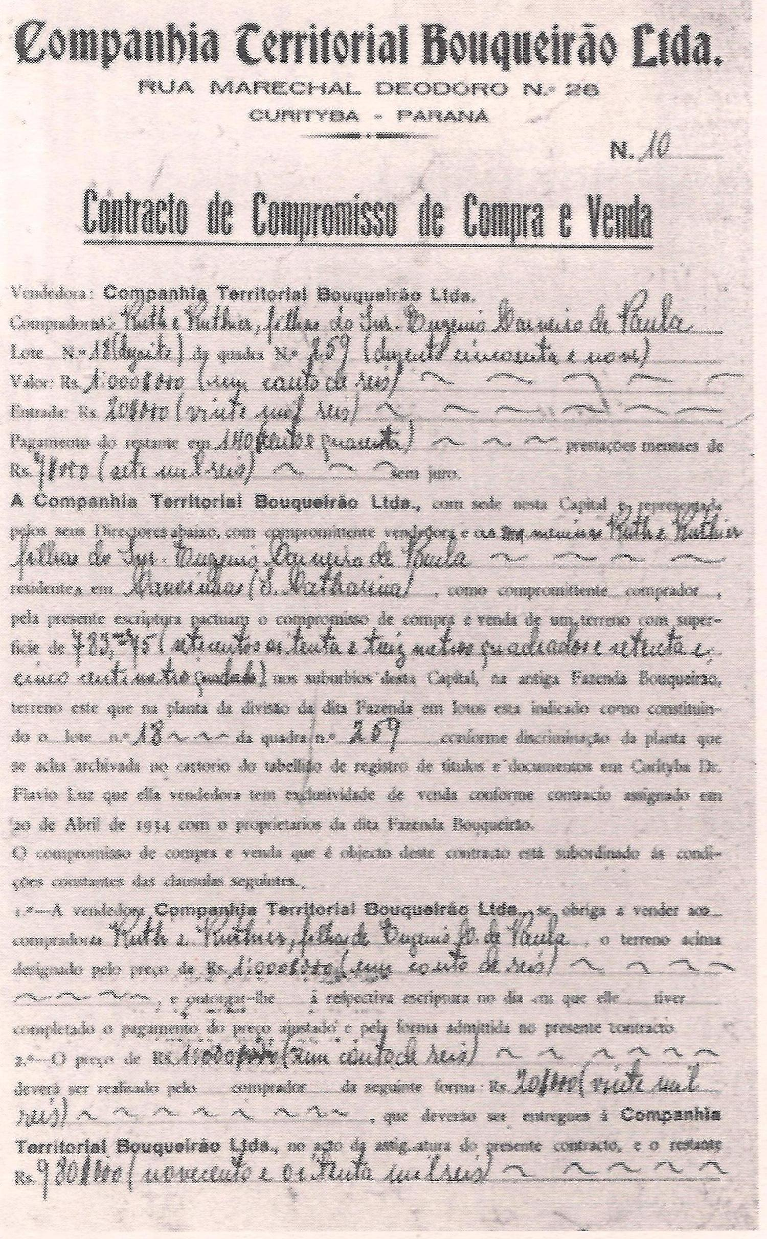 Contrato da Companhia Territorial Boqueirão (Curitiba)